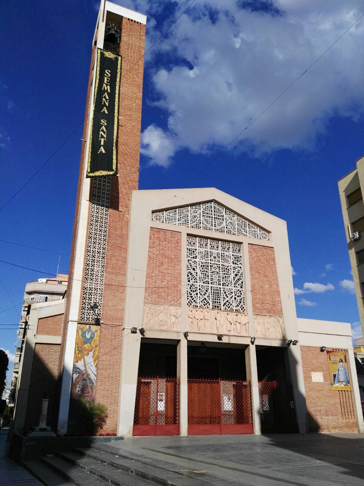 Iglesia de San Pedro Apostol